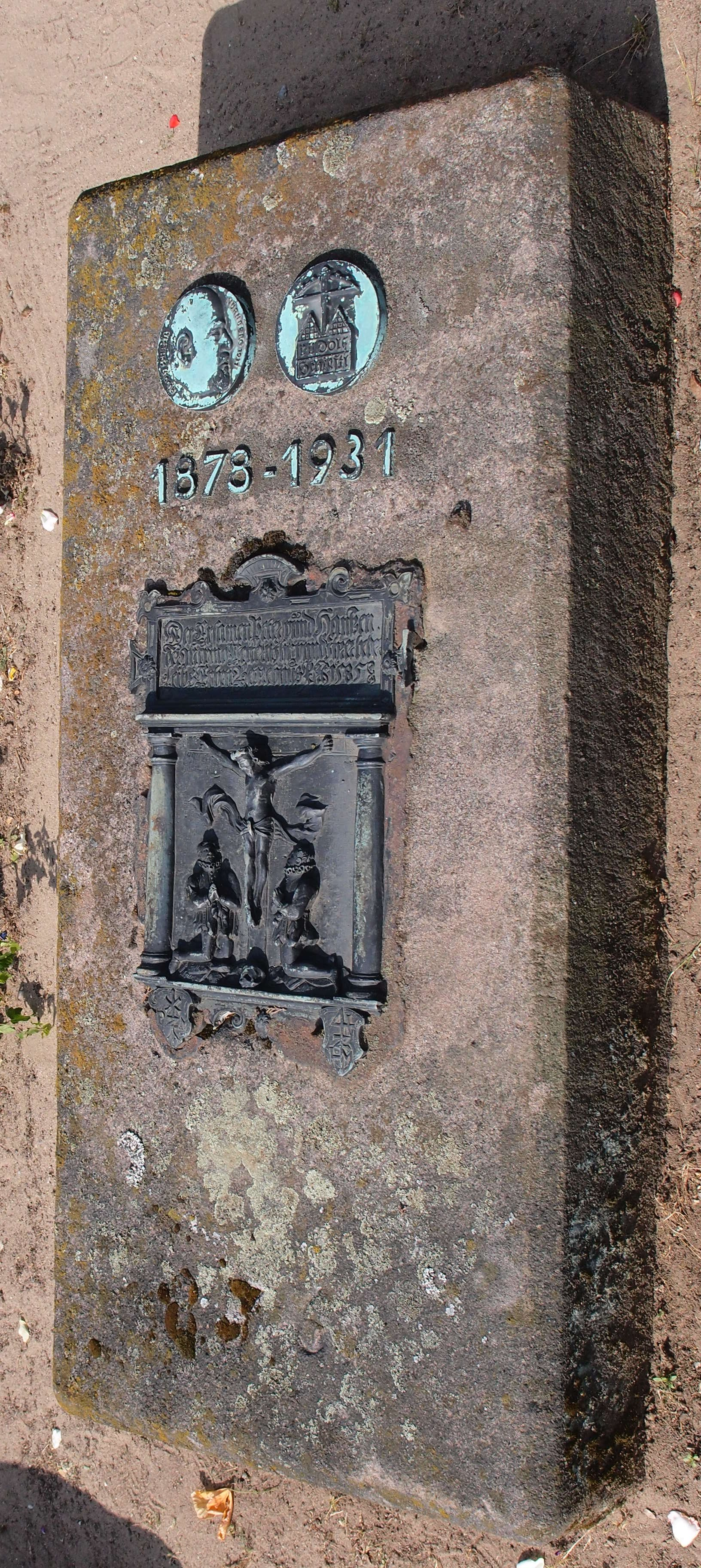 Grab von Rudolf Schiestl auf dem Johannis-Friedhof in Nürnberg